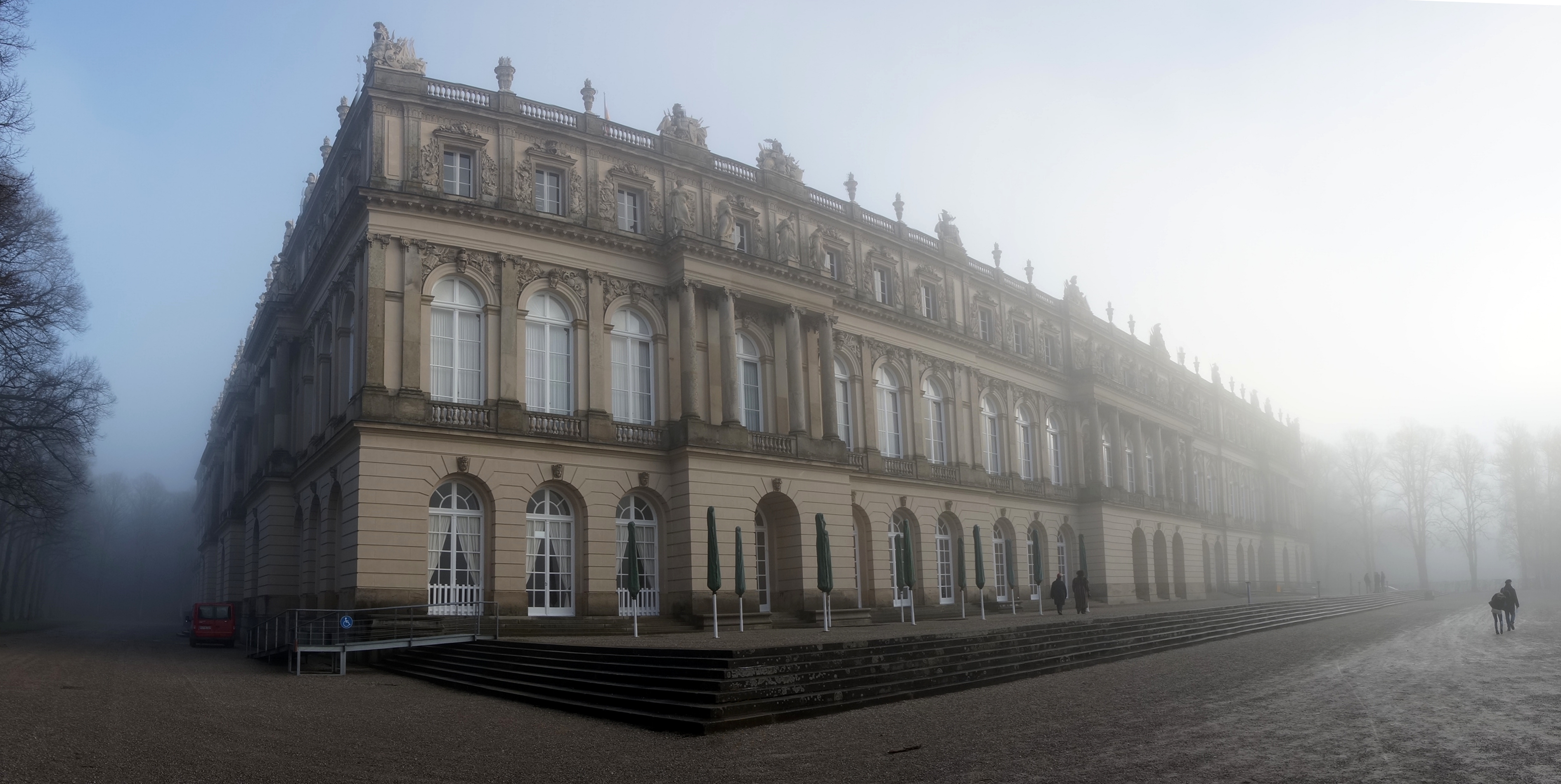 Deutschland, Oberbayern, Chiemsee, Herreninsel, Neues Schloß Herrenchiemsee im Dezembernebel